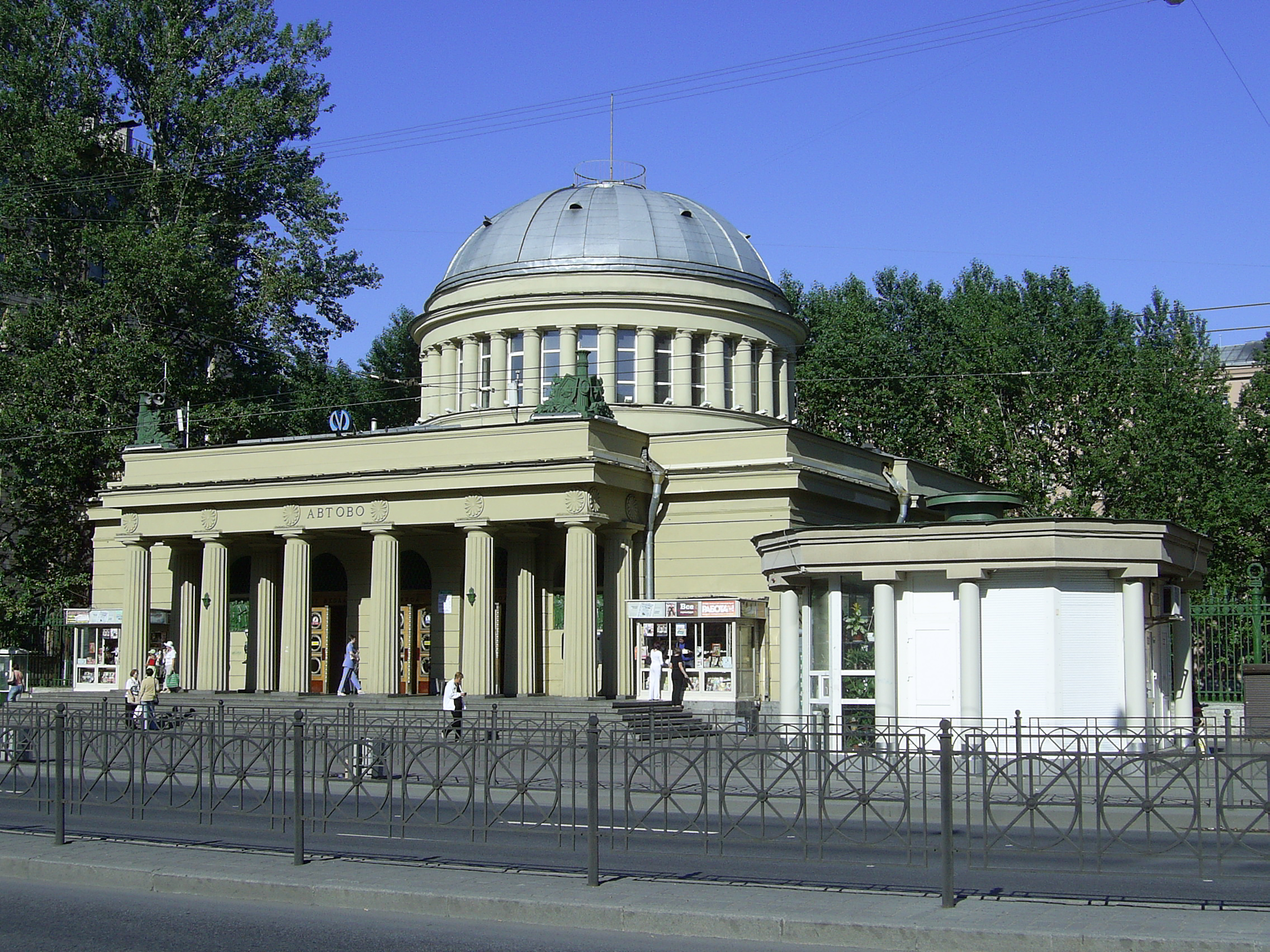 Avtovo - metro station in S-Petersburg